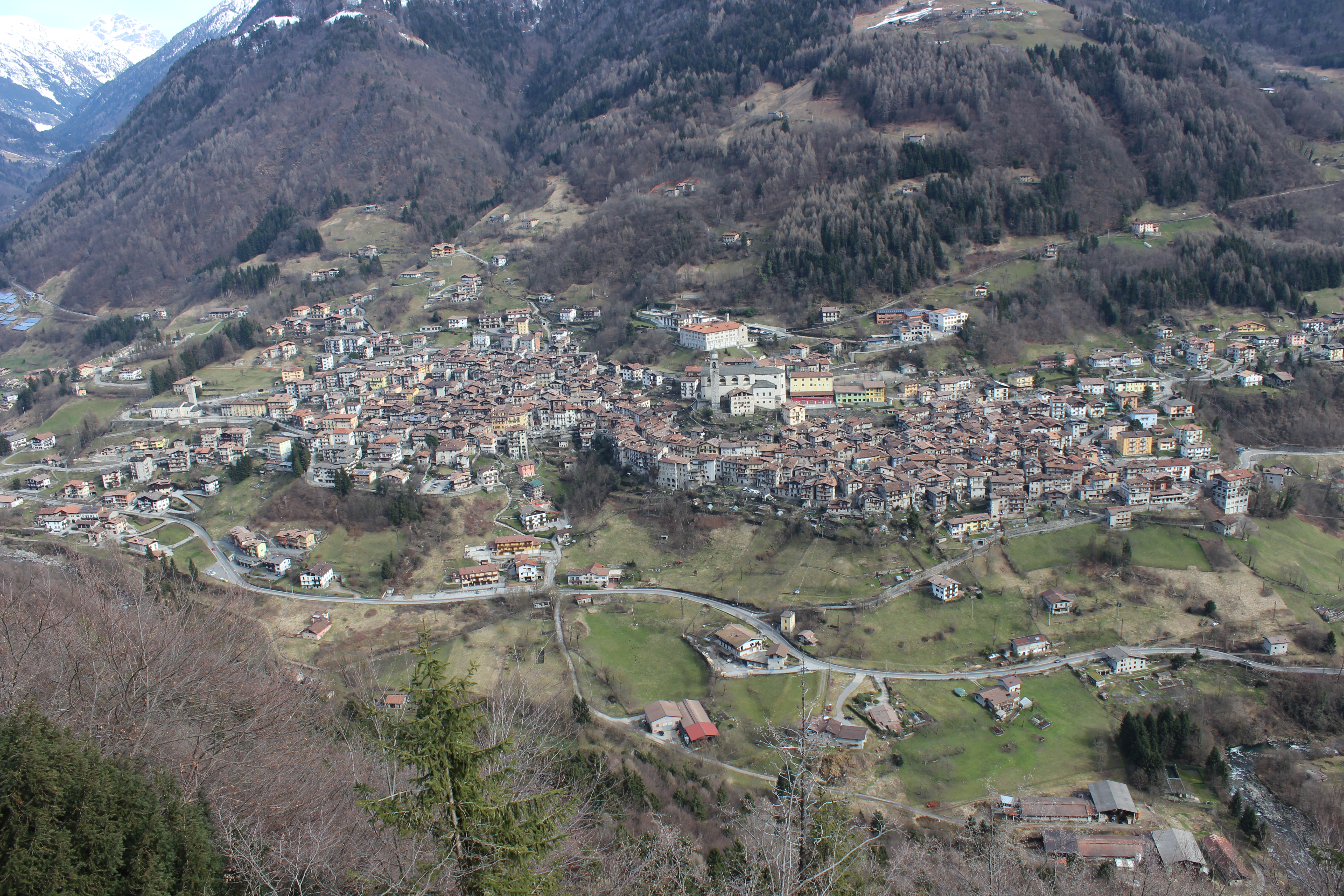 Bagolino.